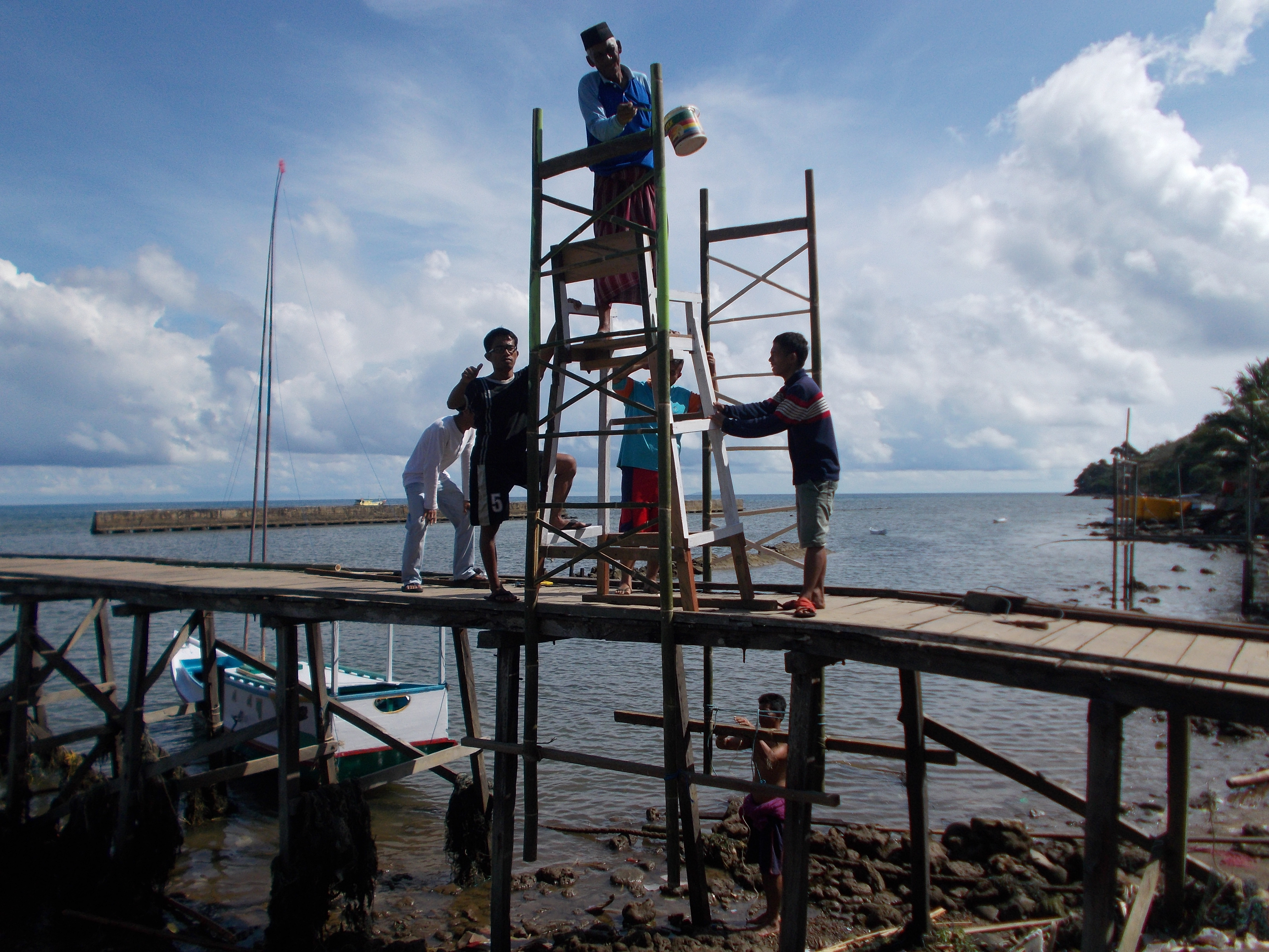 Masyarakat Maradapan bergotong royong untuk membuat gapura selamat datang desa.